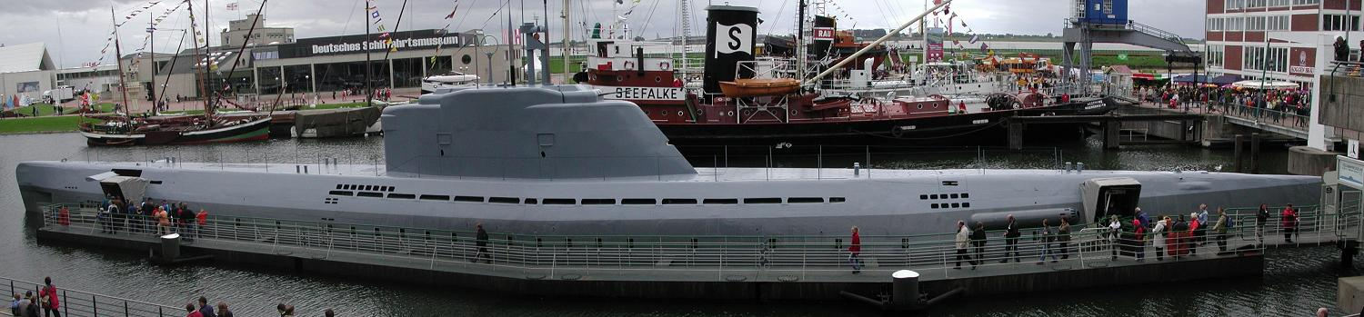 Technik-Museum U-Boot Wilhelm Bauer U-Boot Wilhelm Bauer beim Deutschen Schiffahrtsmuseum, Bremerhaven - Panoramaaufnahme aus 3 Einzelfotos zusammengesetzt